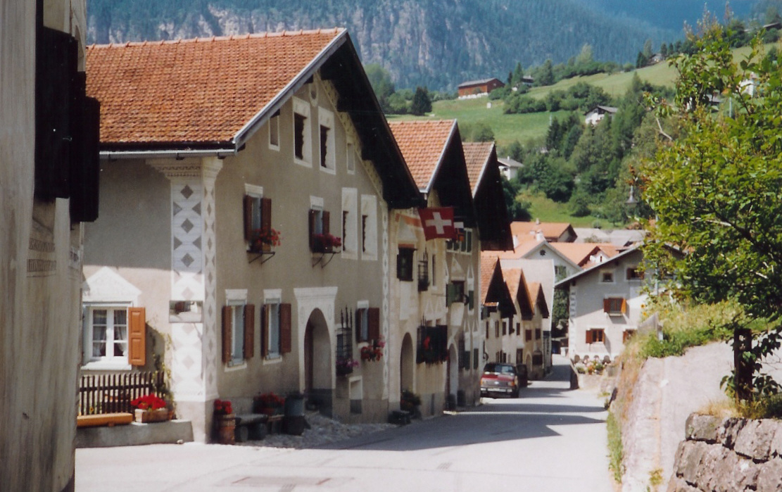 Zelfgemaakte foto. Foto gemaakt in het dorpje Filisur.